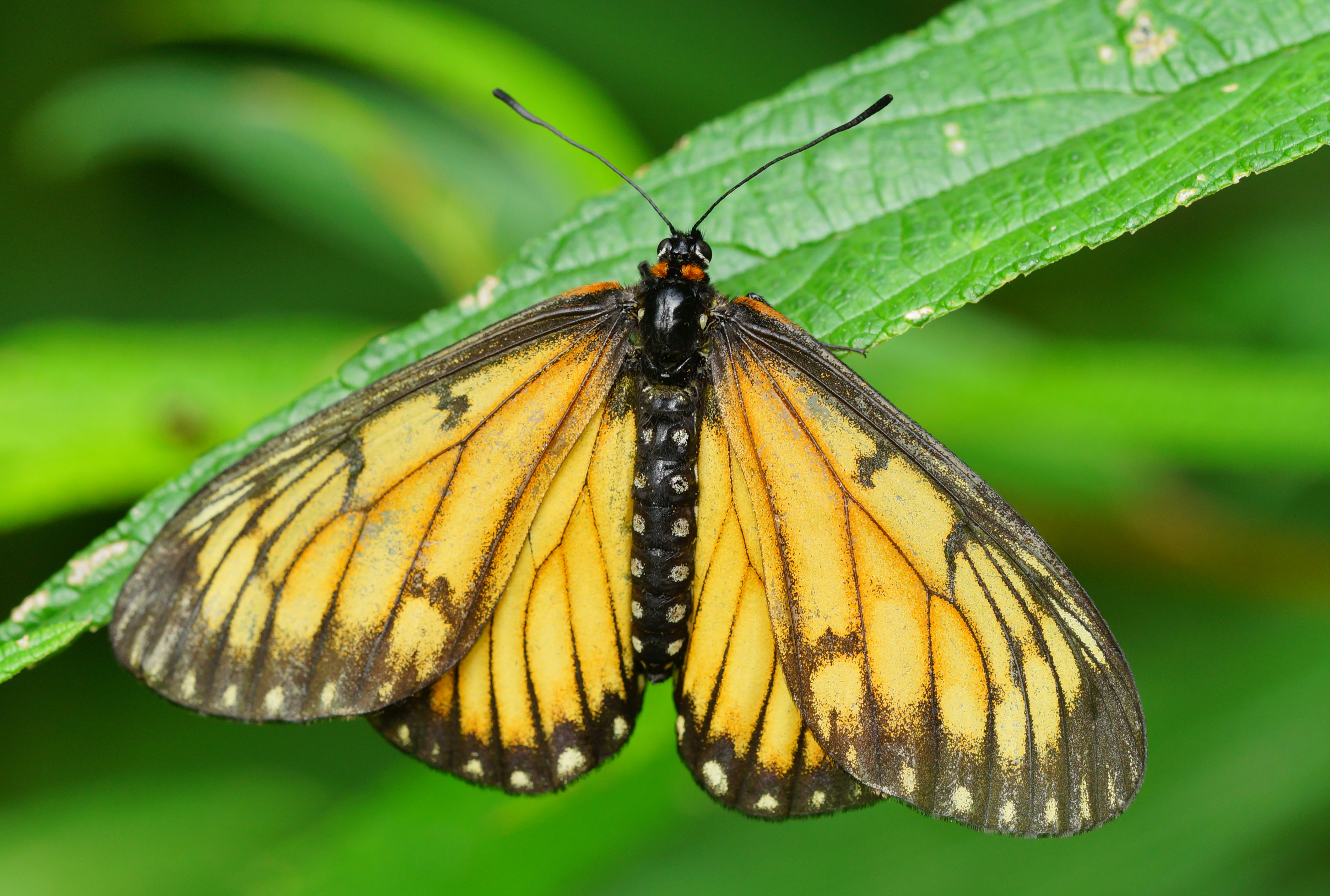 苧麻珍蝶 Acraea issoria formosana